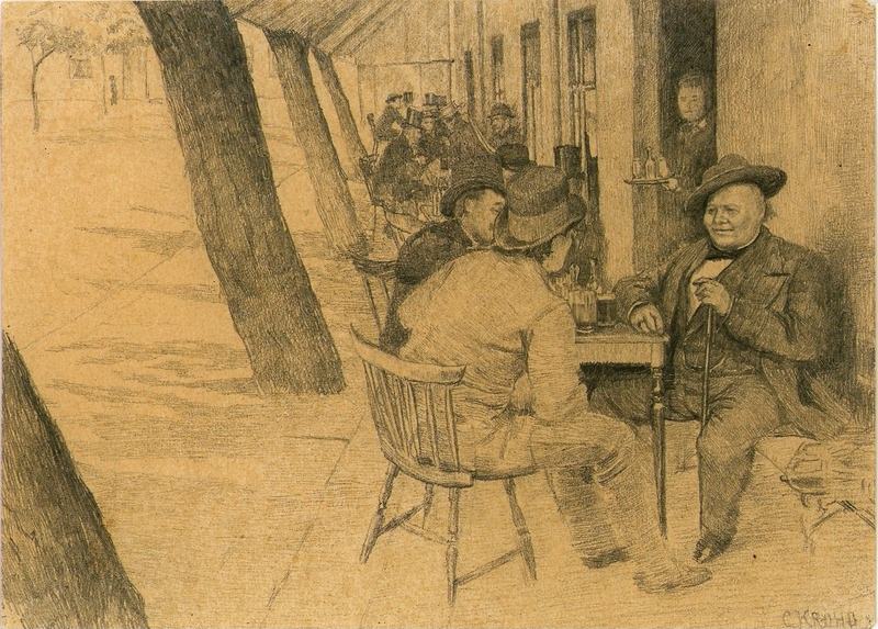 Fortaus-servering på Engebrets Kafé. Depicted person: Johannes Finne Brun, Abraham Christian Hjalmar Frithjof Hammer og Hans Henrik Jæger